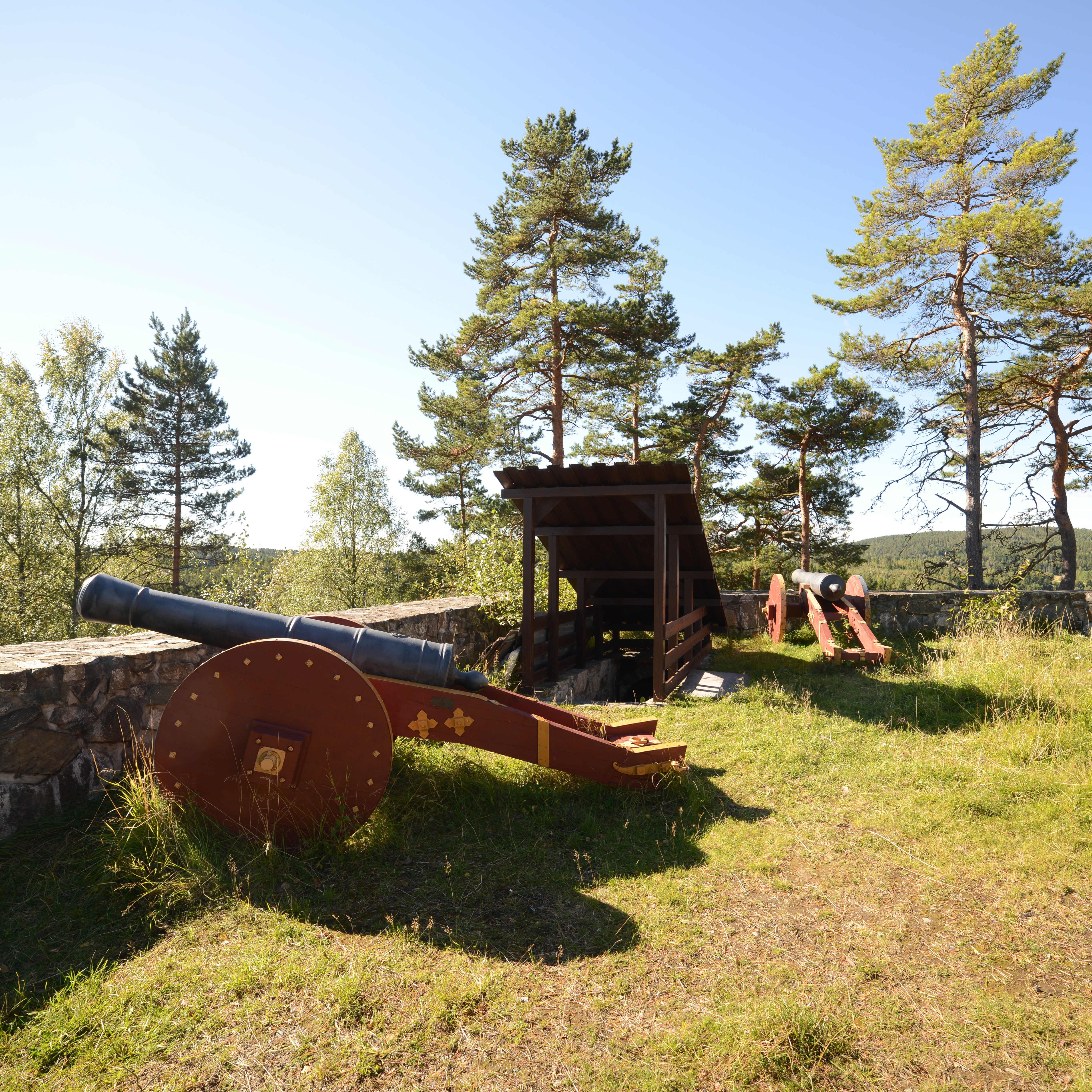 Restene av tårnet ved festningen